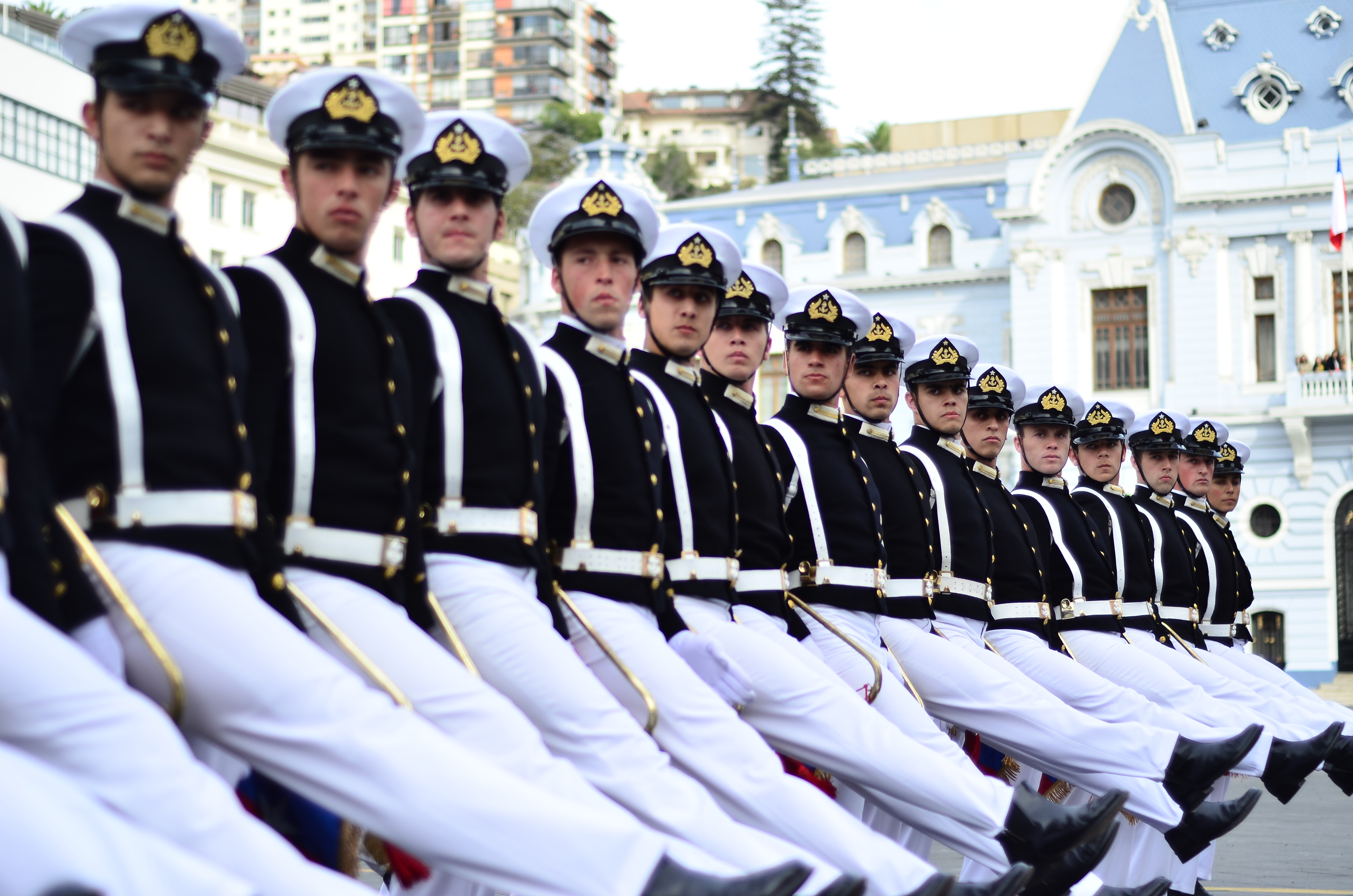 Ceremonia 21 de Mayo